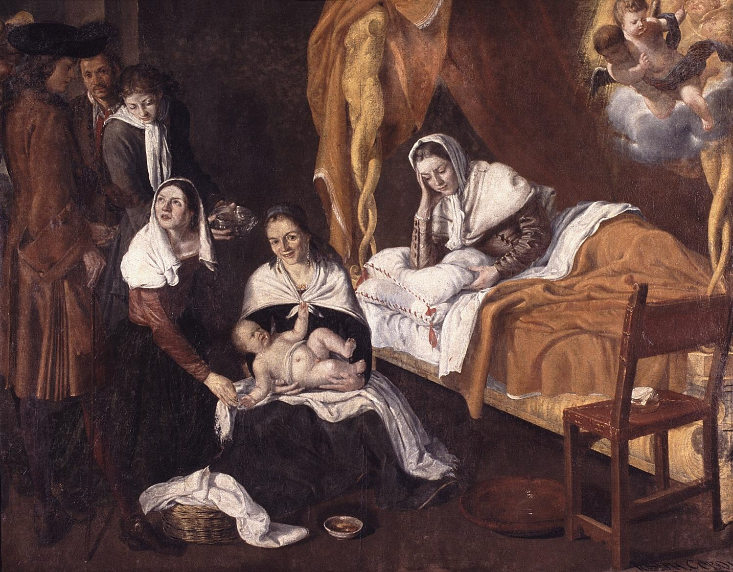 La obra representa el nacimiento de San Pedro Nolasco.